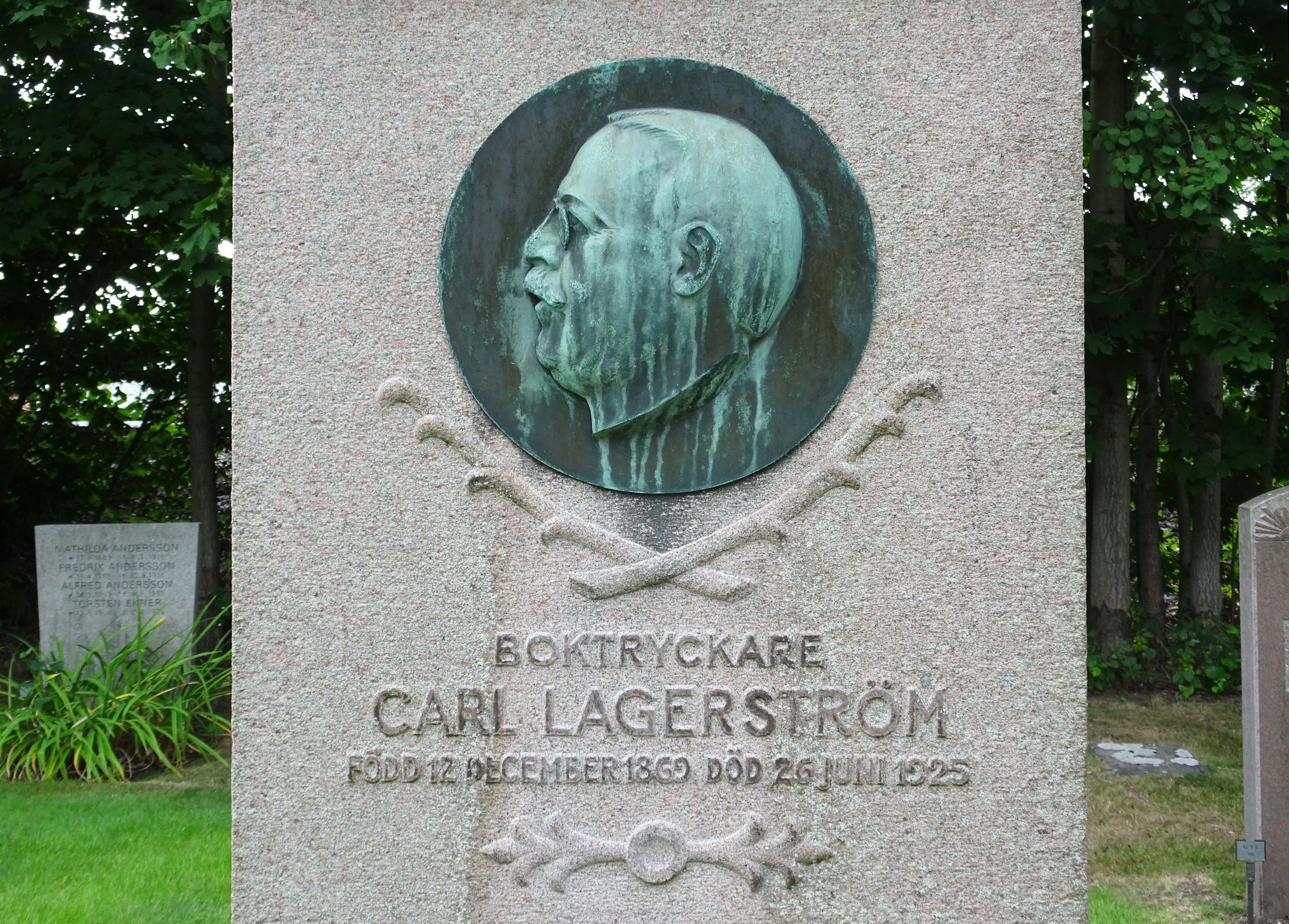 Sandsborgskyrkogården, Carl Lagerström (1869-1925)